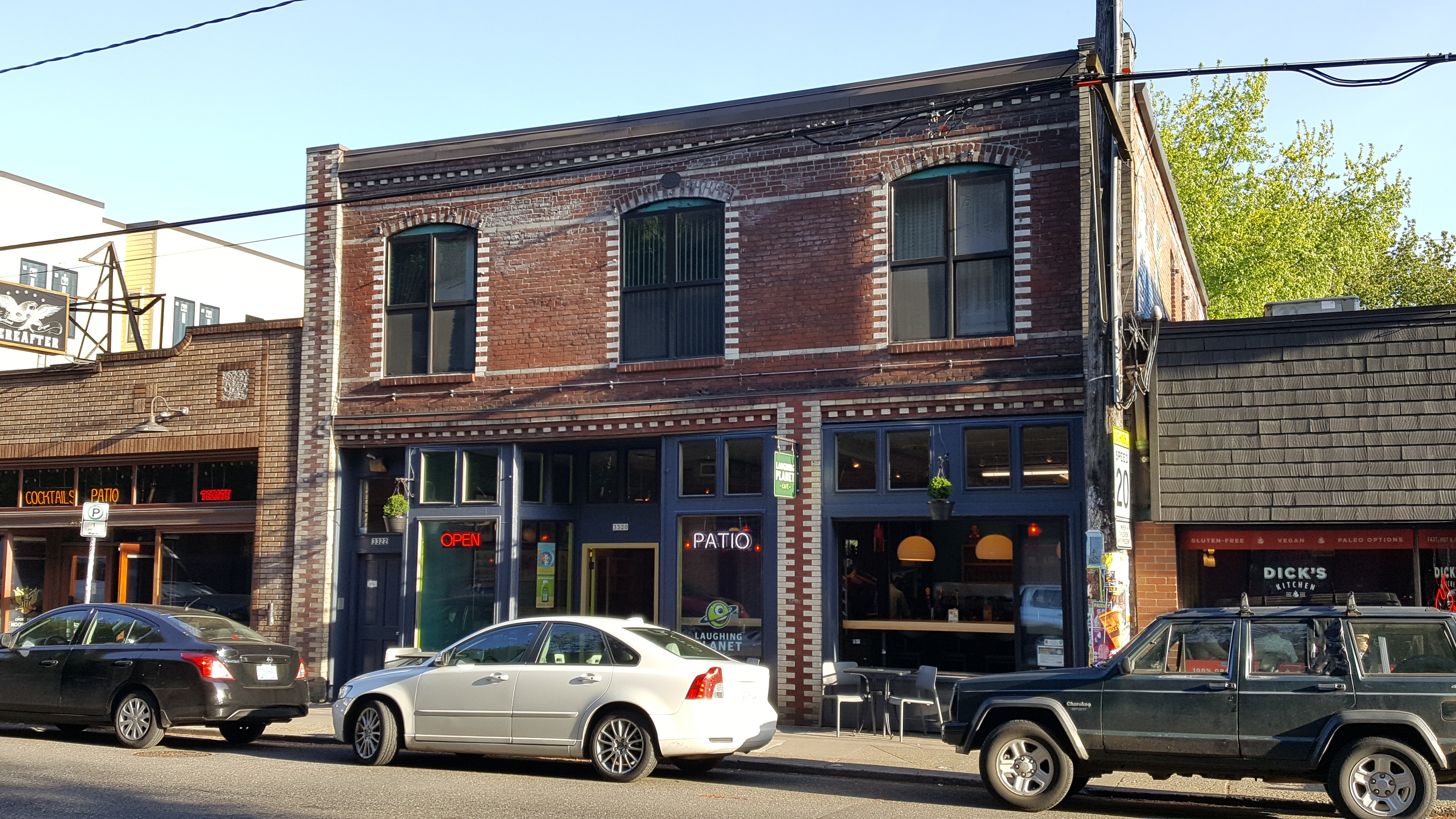 Belmont